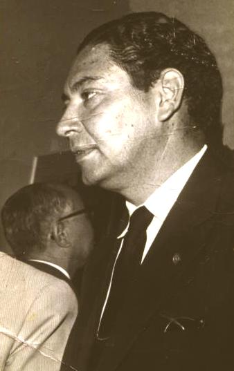 DIPLOMATICO DE CARRERA, TENOR, AUTOR y COMPOSITOR SALVADOREÑO